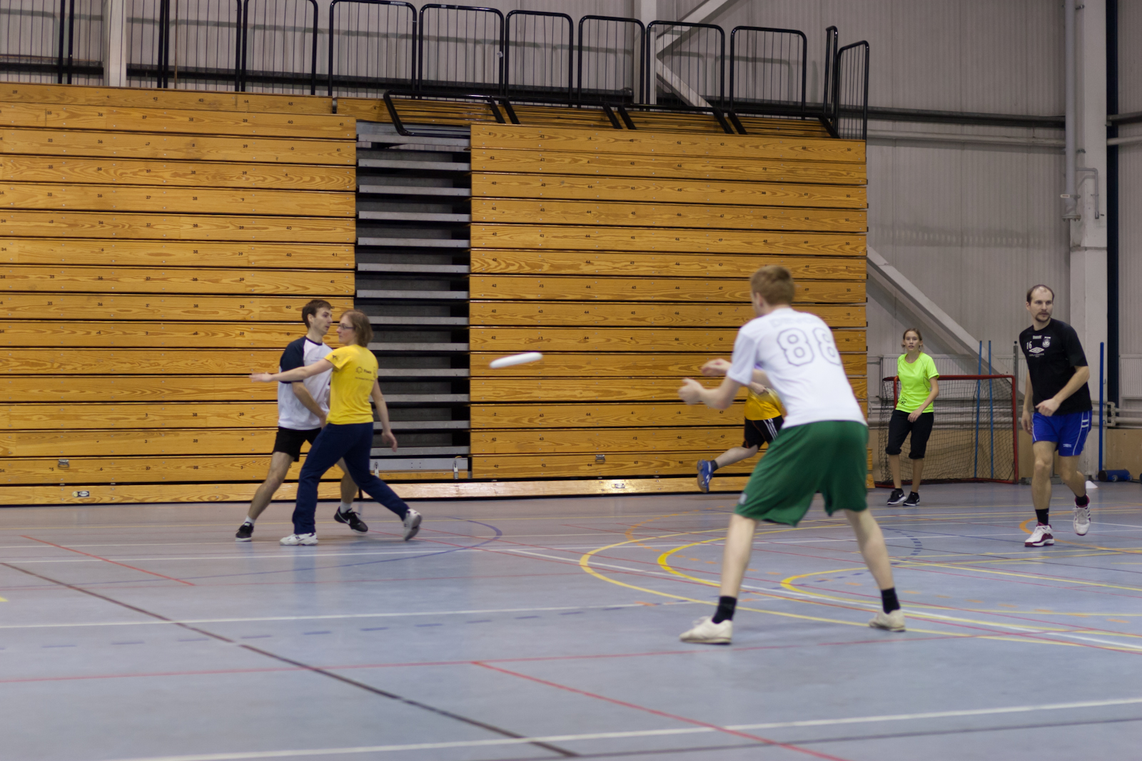 Tartu frisbeeklubi. Tartu Ülikooli spordihoone.